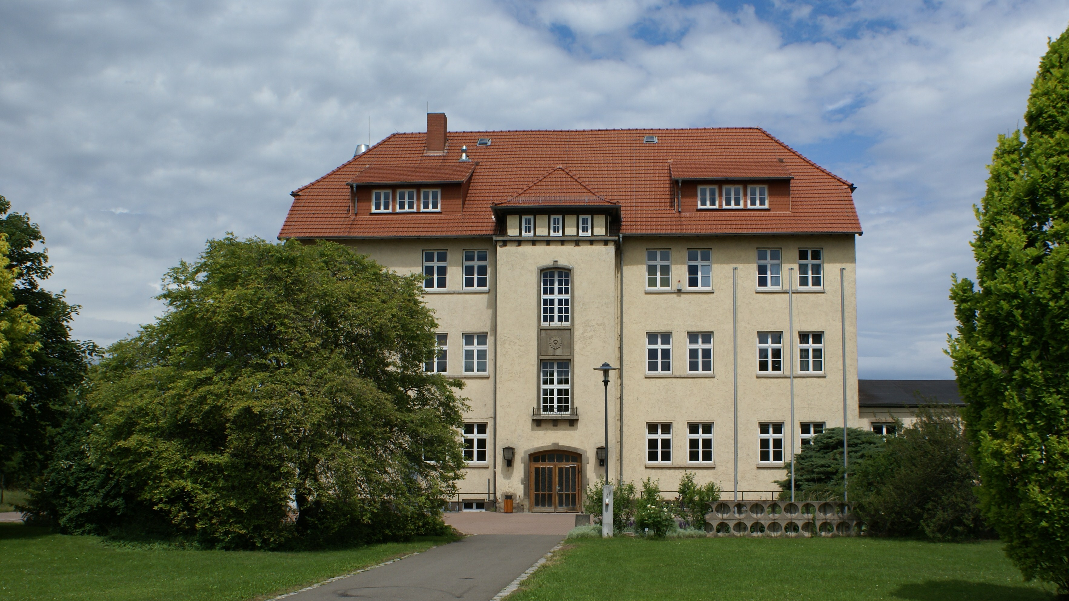 Gebäude der Fachhochschule Erfurt (Fachrichtungen Landschaftsarchitektur, Gartenbau und Forstwirtschaft) am Standort Leipziger Straße in Erfurt.